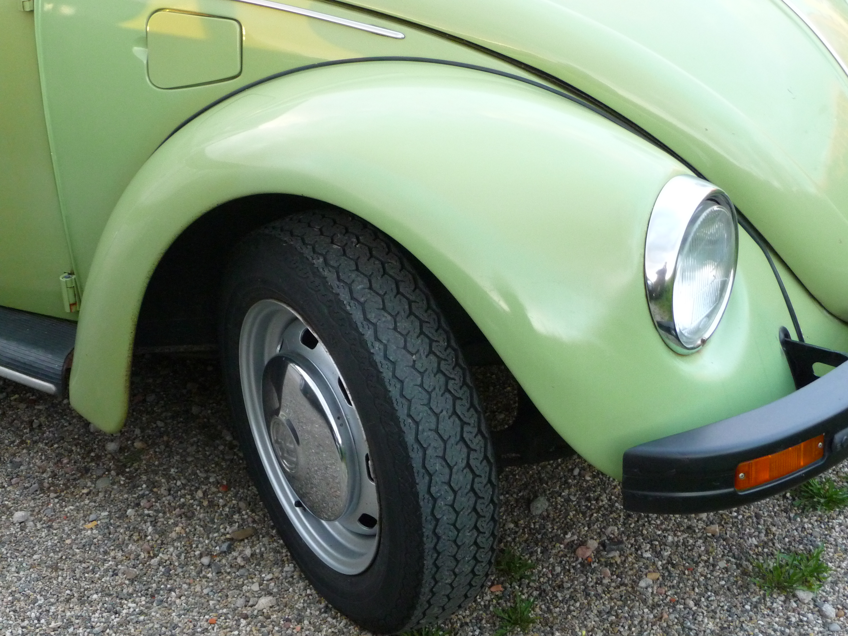 Kotflügel eines VW-Käfer (es gibt sie immer noch!)